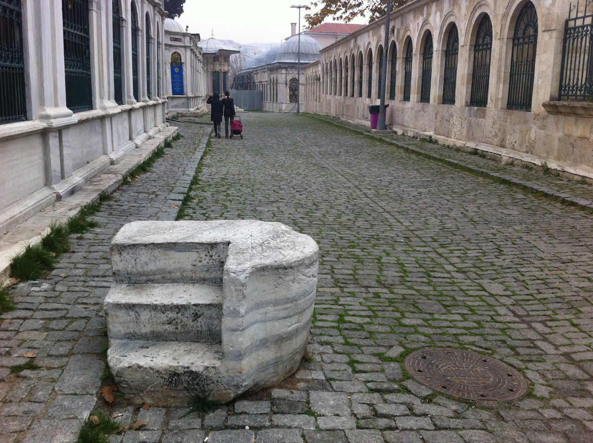 Bir zamanlar at binmek için üzerine çıkılan taş. Binek Taşı. Cülüsyolu-Eyüpsultan...